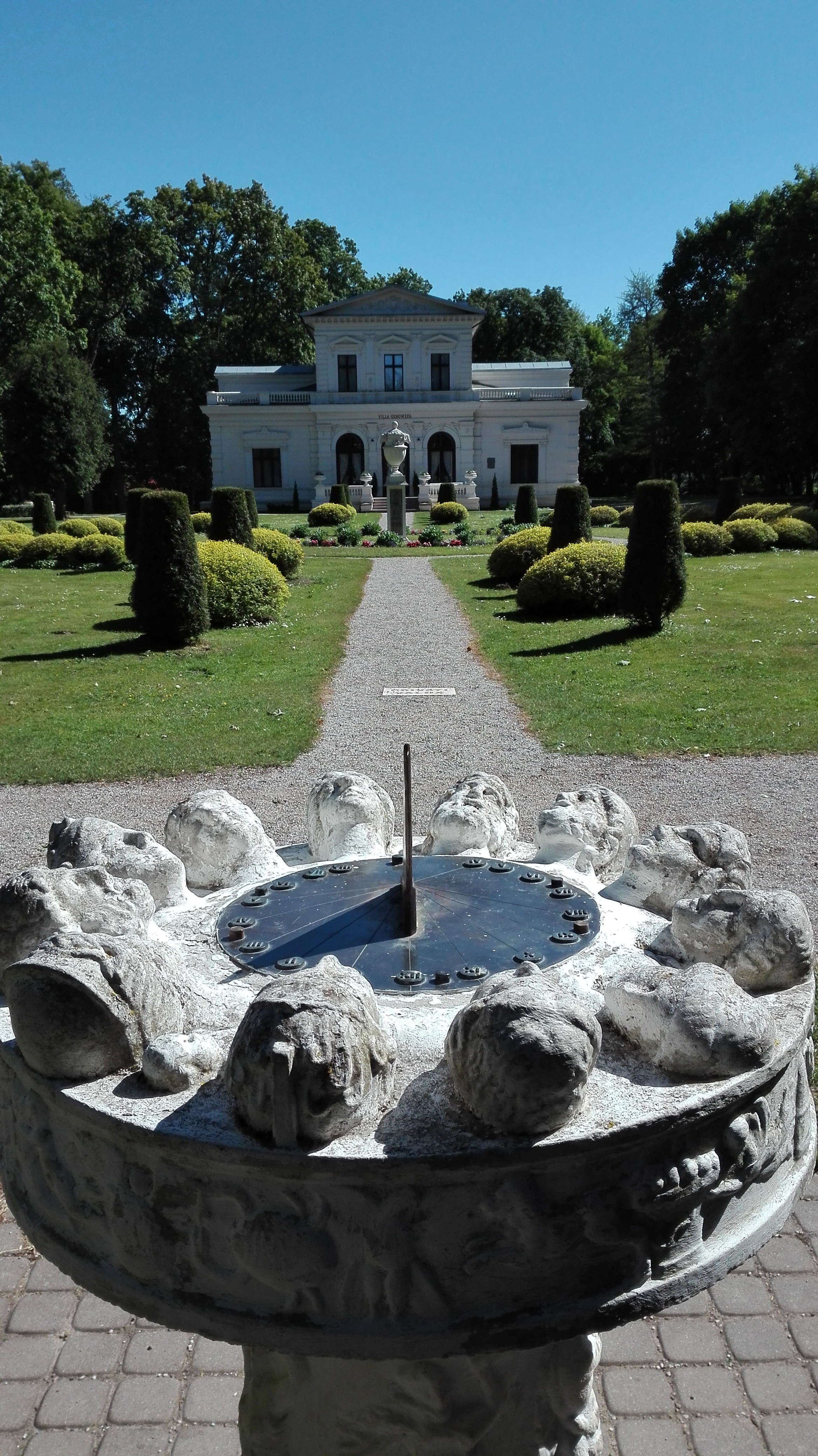 Švėkšnos dvaro saulės laikrodis